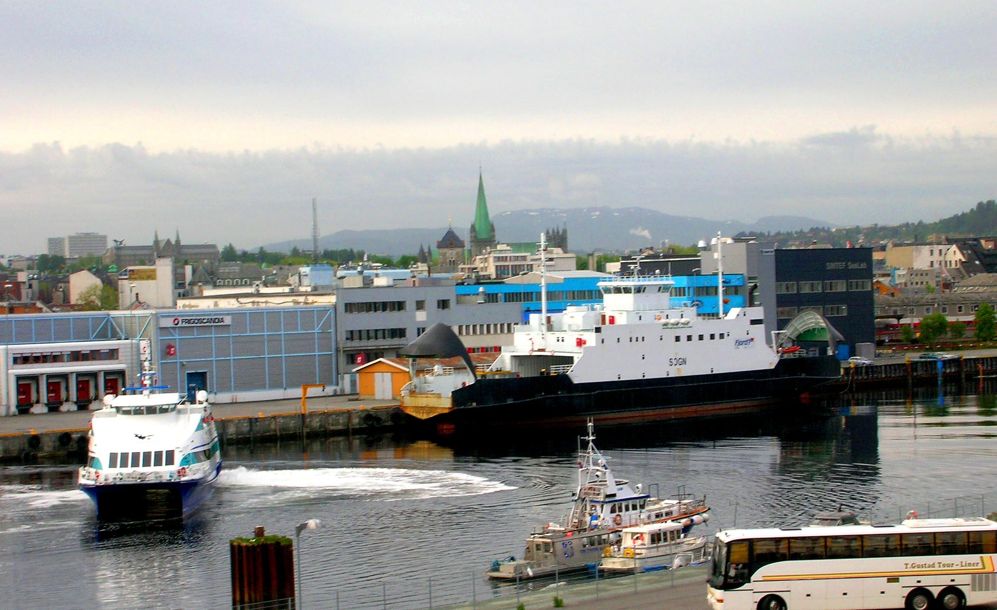 Hafen vun Trondheim (2006)